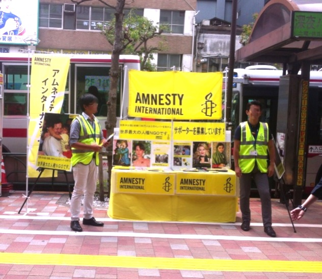 日本のアムネスティ・インターナショナル (Japanese branch of Amnesty International)